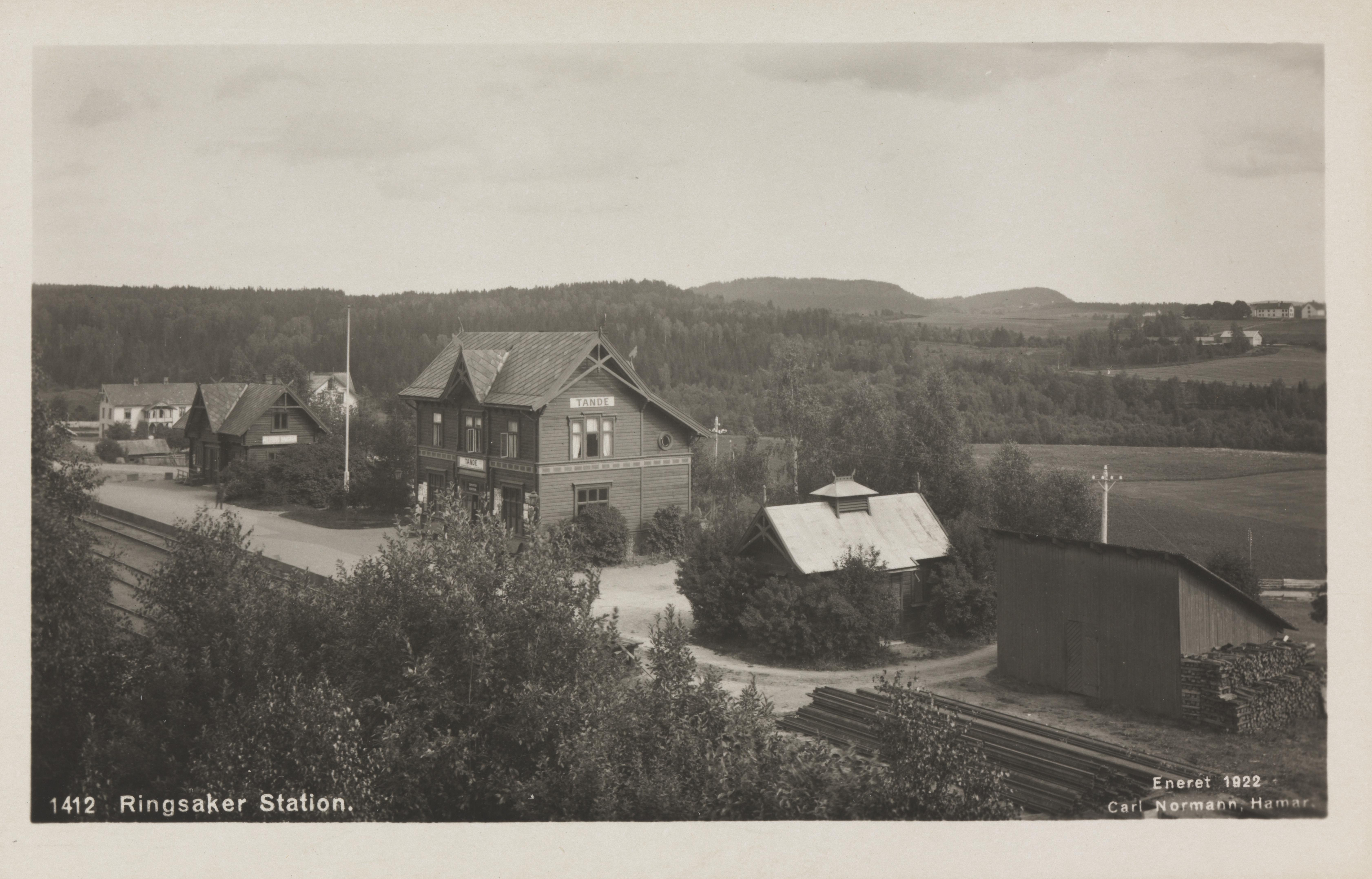 Bildet er hentet fra Nasjonalbibliotekets bildesamling Ringsaker stasjon, Ringsaker, Hedmark